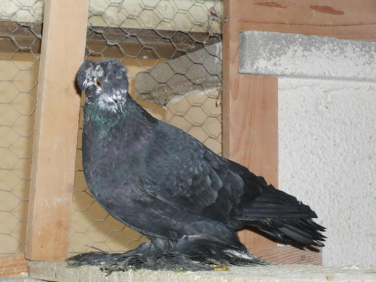 český bublák černý